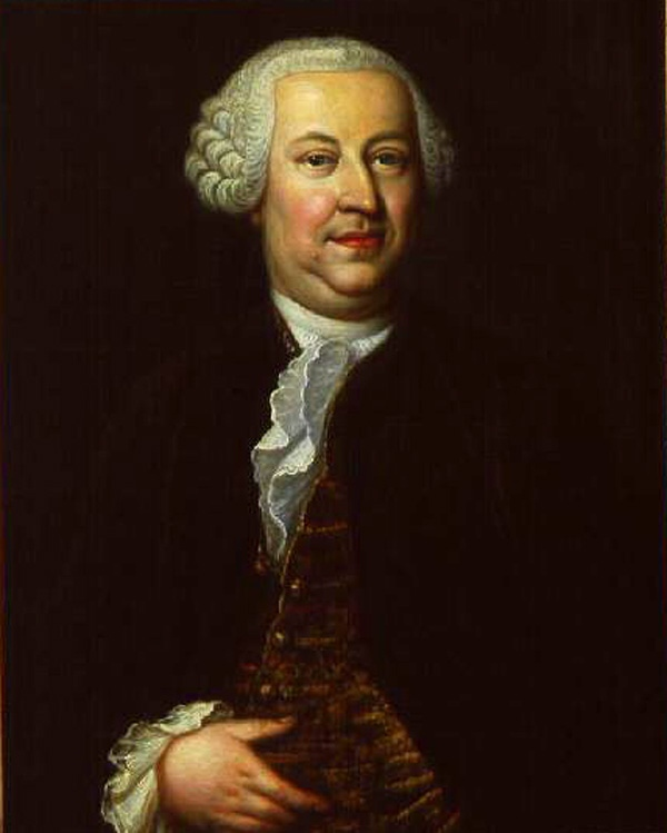 Christian Wilhelm Küstner, Gemälde von Elias Gottlob Haußmann